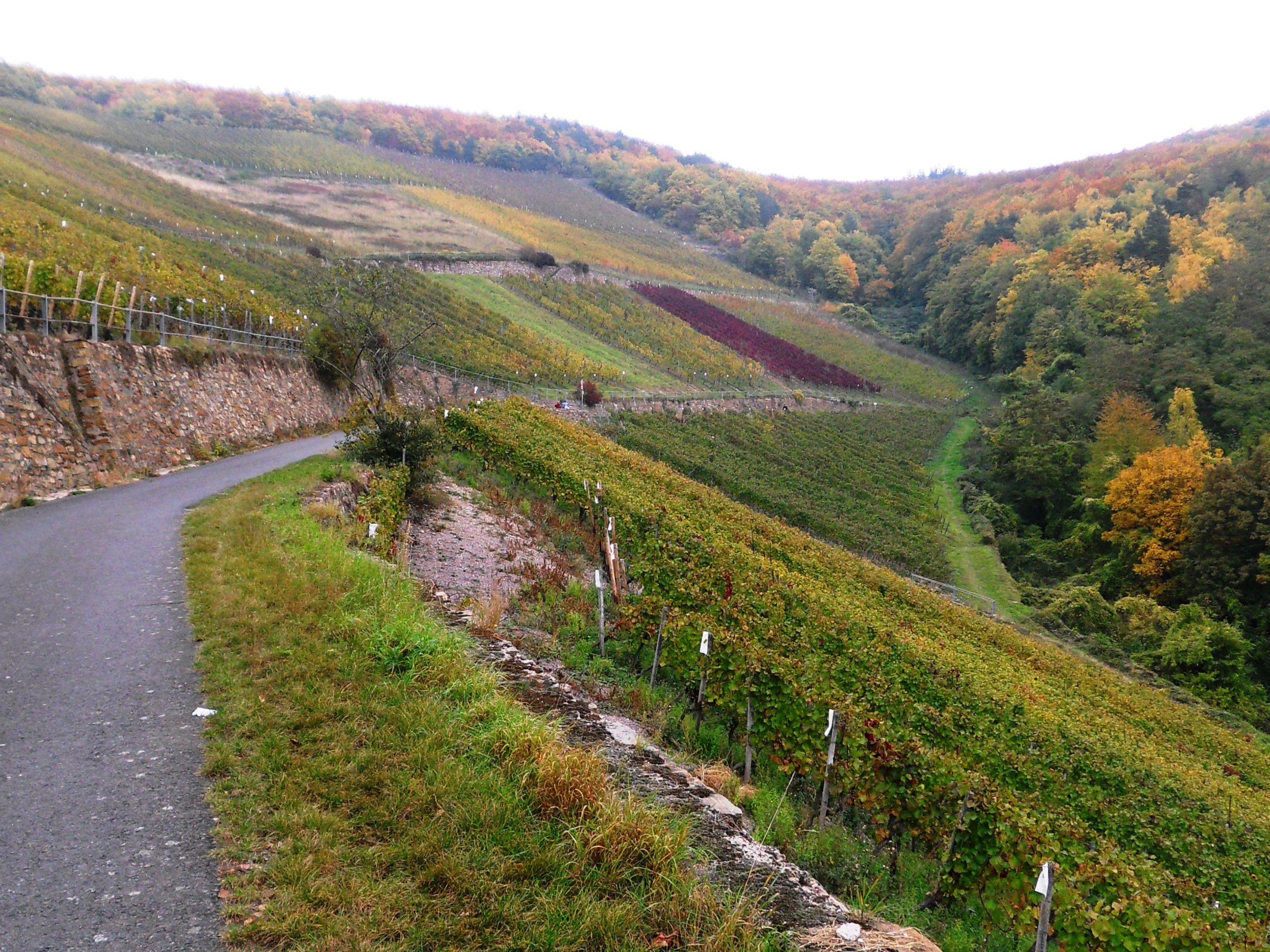 Die Weinlage Frankenthal in Assmannshausen endet im Süden in einem kurzen, steil ansteigenden Kerbtal, dem eigentlichen Frankenthal. Der nach Südwesten exponierte sonnige Hang ist mit Weinreben bepflanzt, der gegenüberliegende schattige Nordwesthang ist bewaldet.